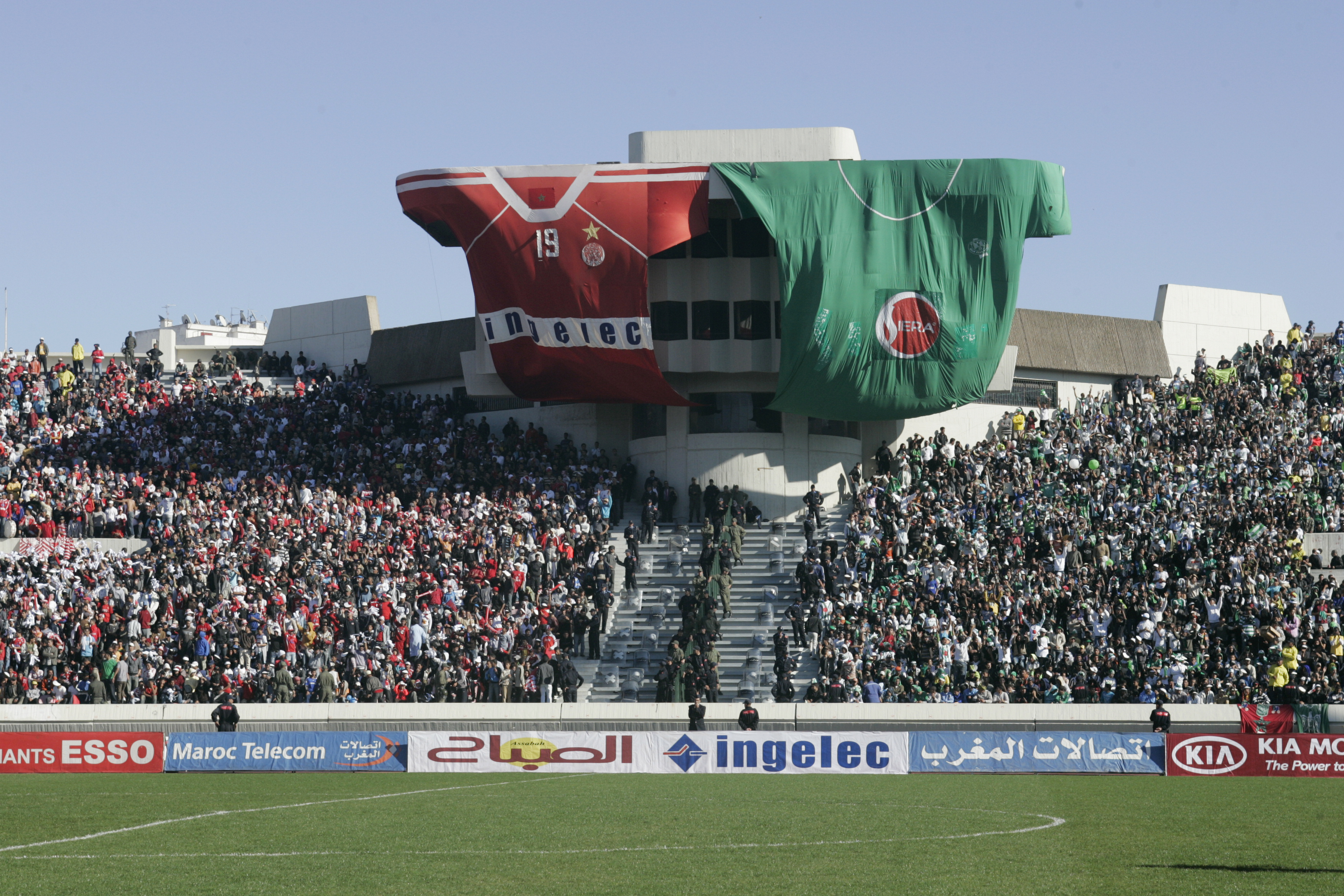 Les deux maillots mythiques du Derby de Casablanca, Stade Mohammed V